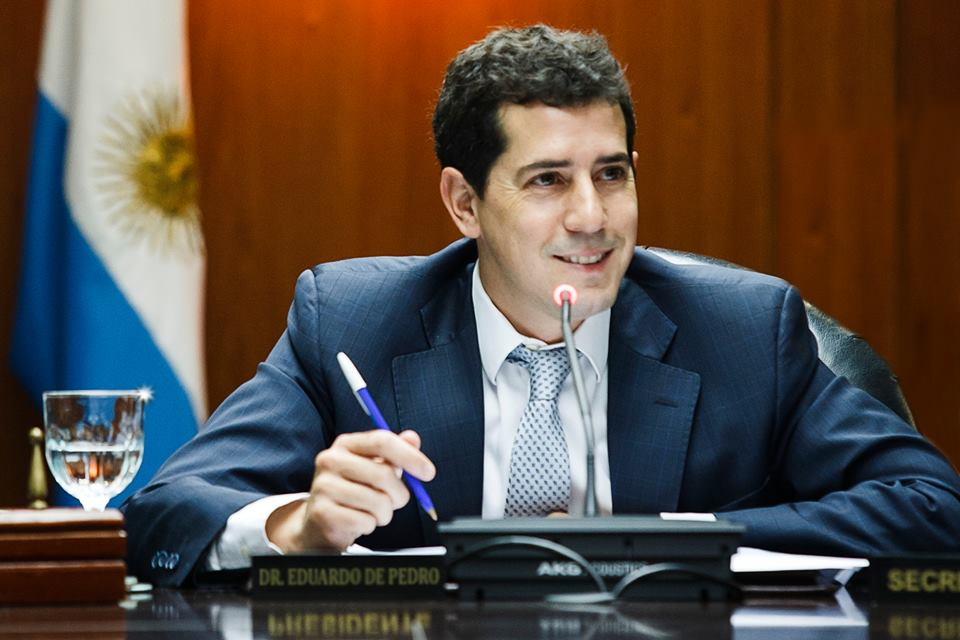 El diputado Eduardo De Pedro